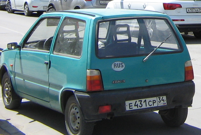 Tsentralnyy rayon, Volgograd, Volgogradskaya oblast', Russia